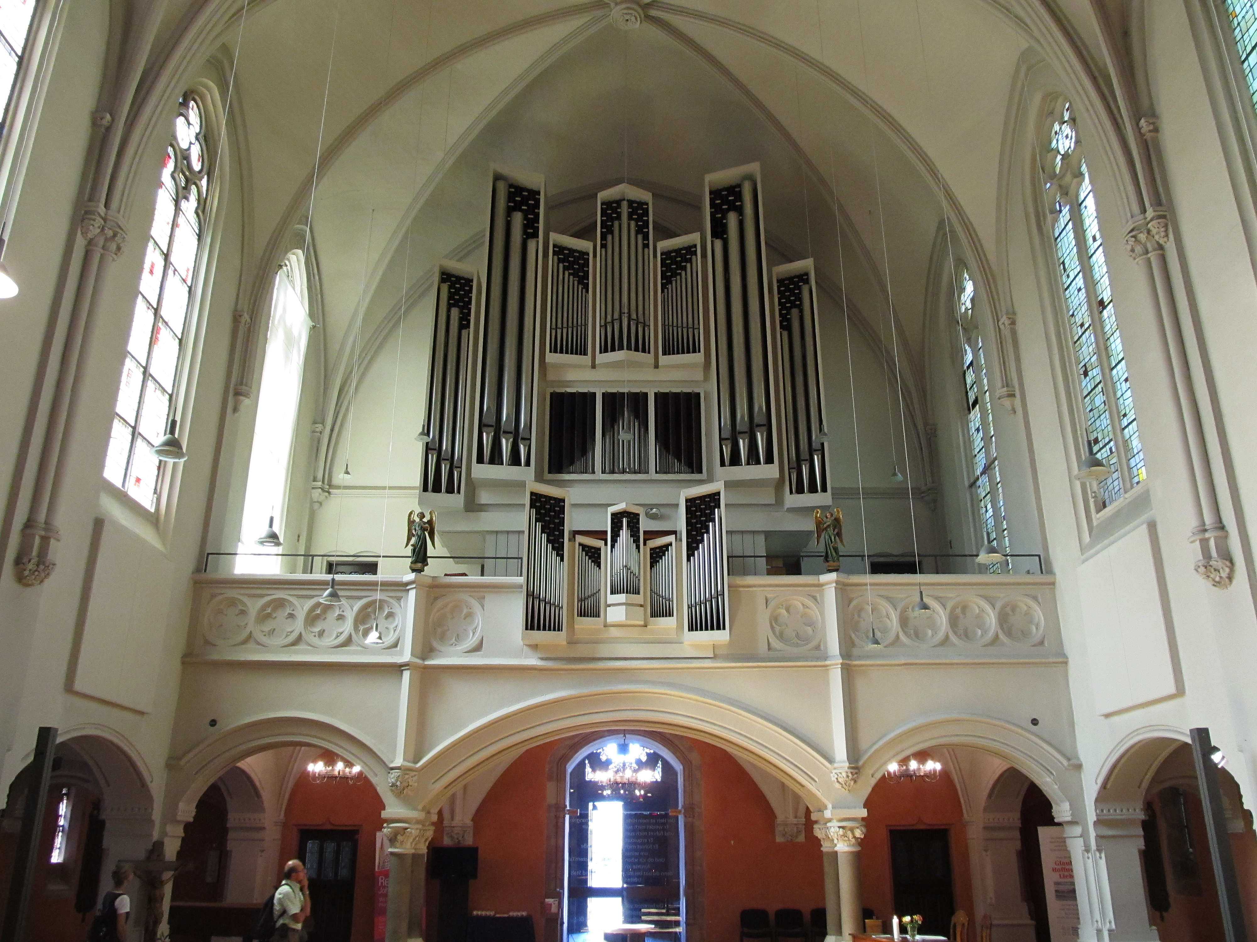 Blick ins Innere der Johanneskirche in Saarbrücken, Saarland